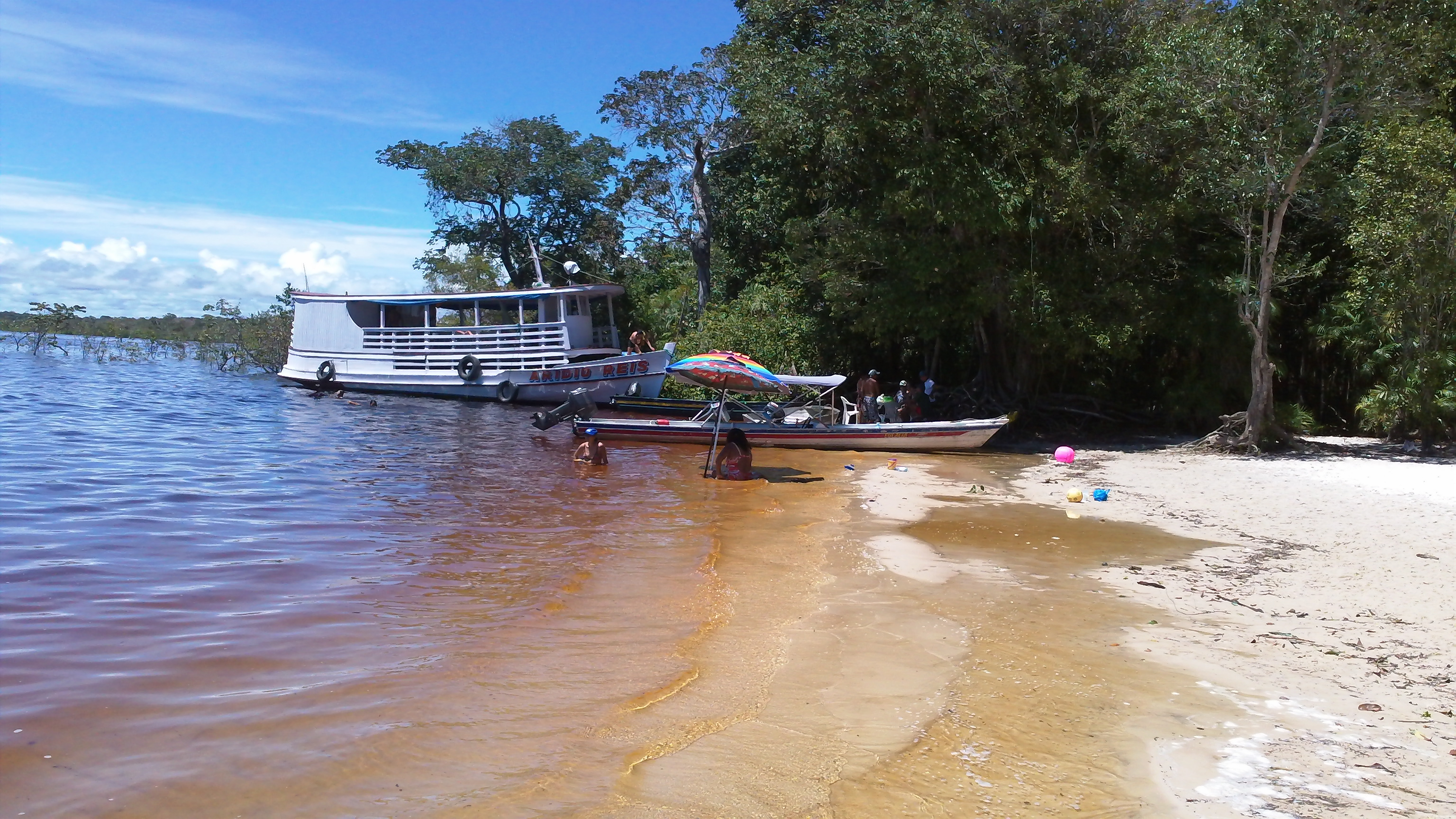 Rio Negro - Praia do Boto Rosa